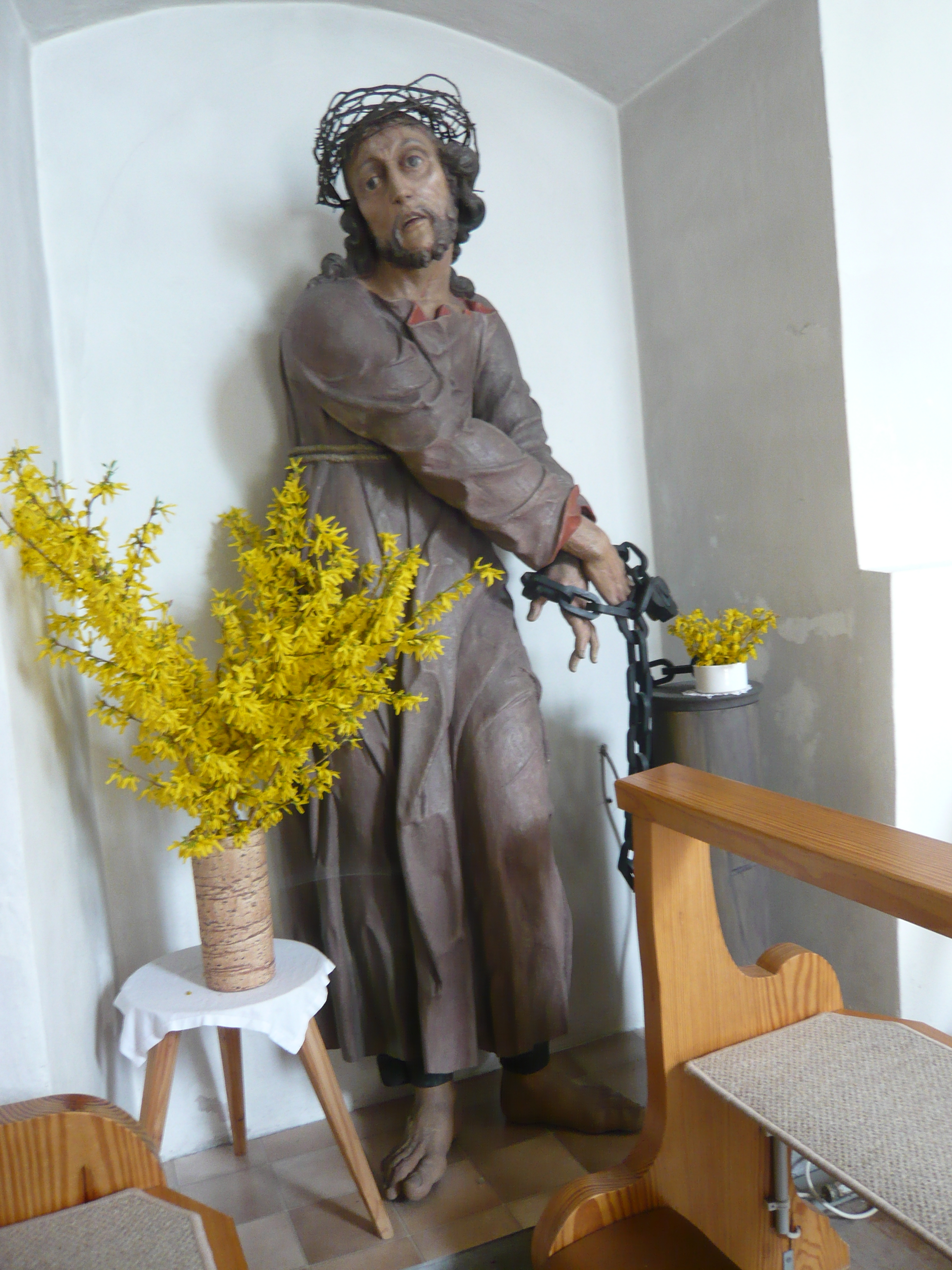 Kerkerchristus in St. Martin, Kappel, Gemeinde Pfronten, Ostallgäu